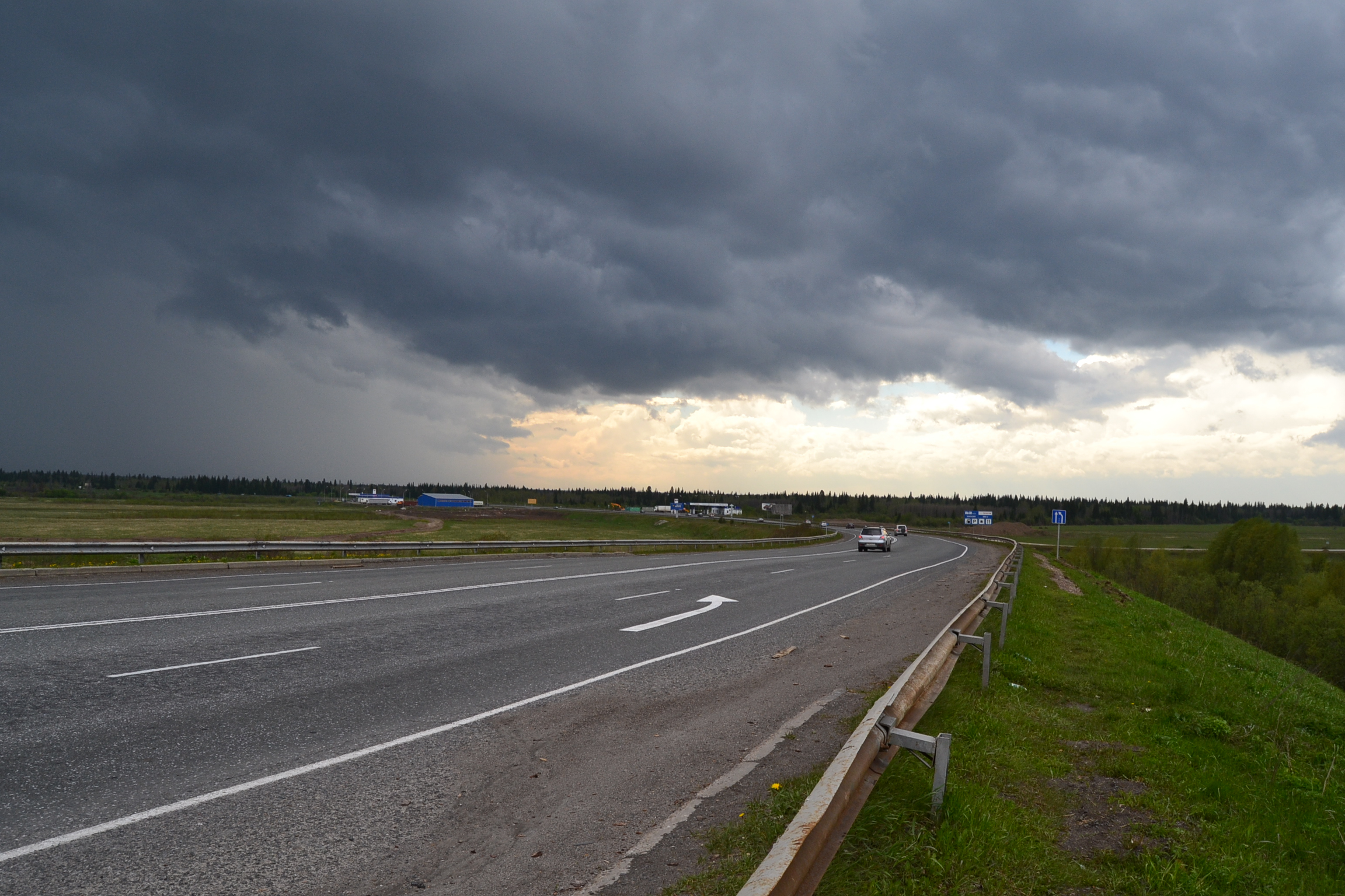 Северный объезд Томска, Новый мост. Справа холодный фронт, слева тёплый.